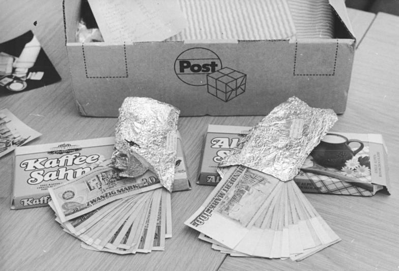 ADN-ZB Hirndorf 30.11.89 Bez. Erfurt: Schmuggel Das Röntgenbild brachte es an den Tag: In Schokoladentafeln versteckt sollte DDR-Geld mit der Post ins Land geschmuggelt werden. Die Zollverwaltung Erfurt-Gera-Suhl hat an der 800 Kilometer langen Grenze West alle Hände voll zu tun, um Schmuggel und Spekulation zu unterbinden.